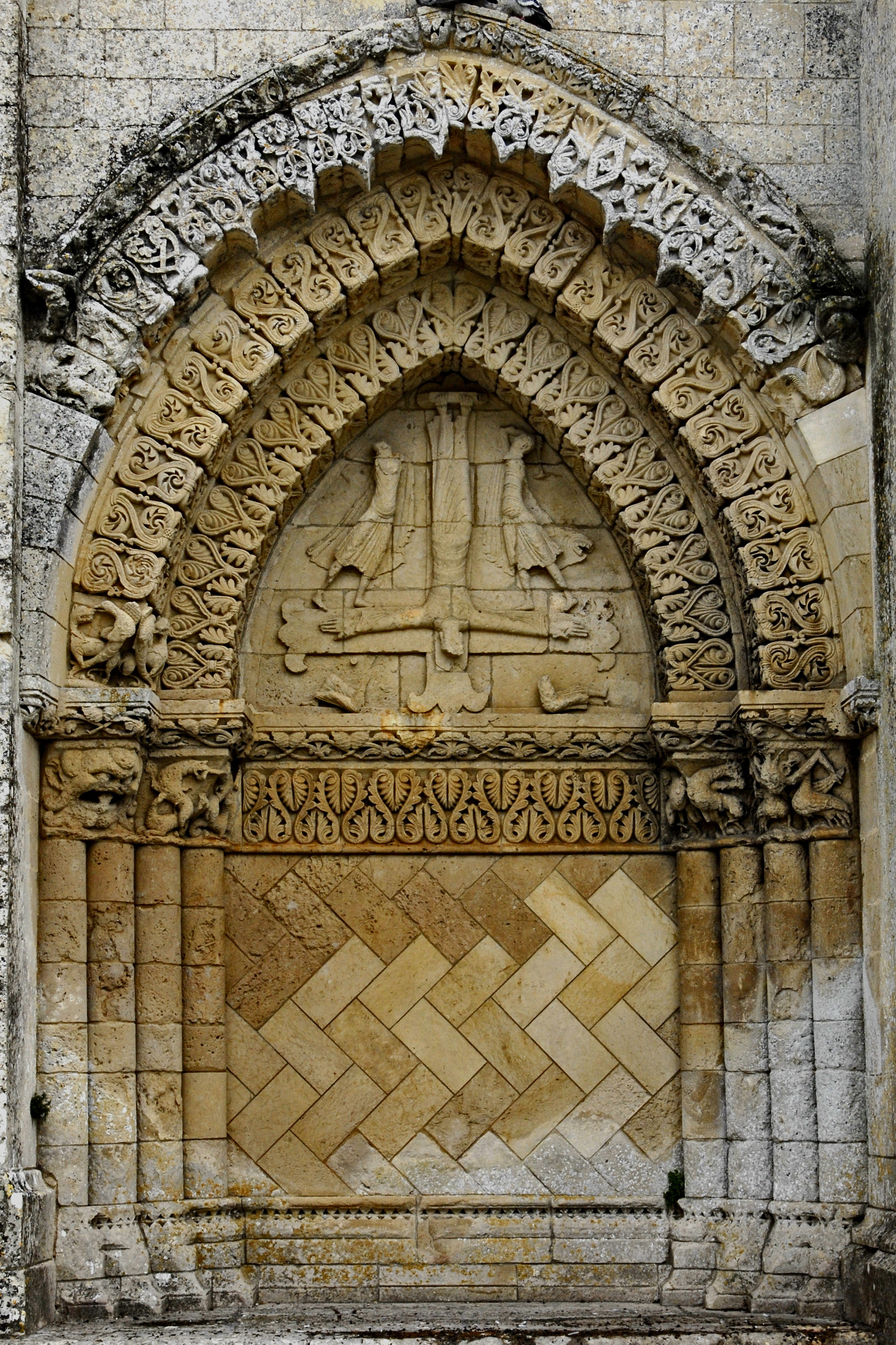 St.-Pierre Aulnay, linkes Scheinportal